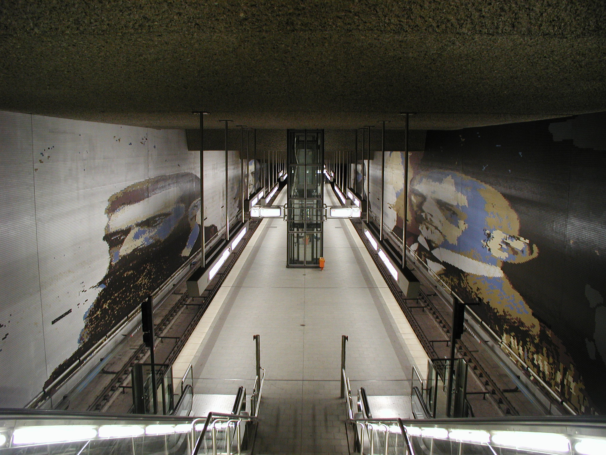 U-Bahnhof Nürnberg Rathenauplatz, Künstlerische Gestaltung des Großmosaiks 1990 von Gregor Hiltner (zeigt links Theodor Herzl, rechts Walther Rathenau)